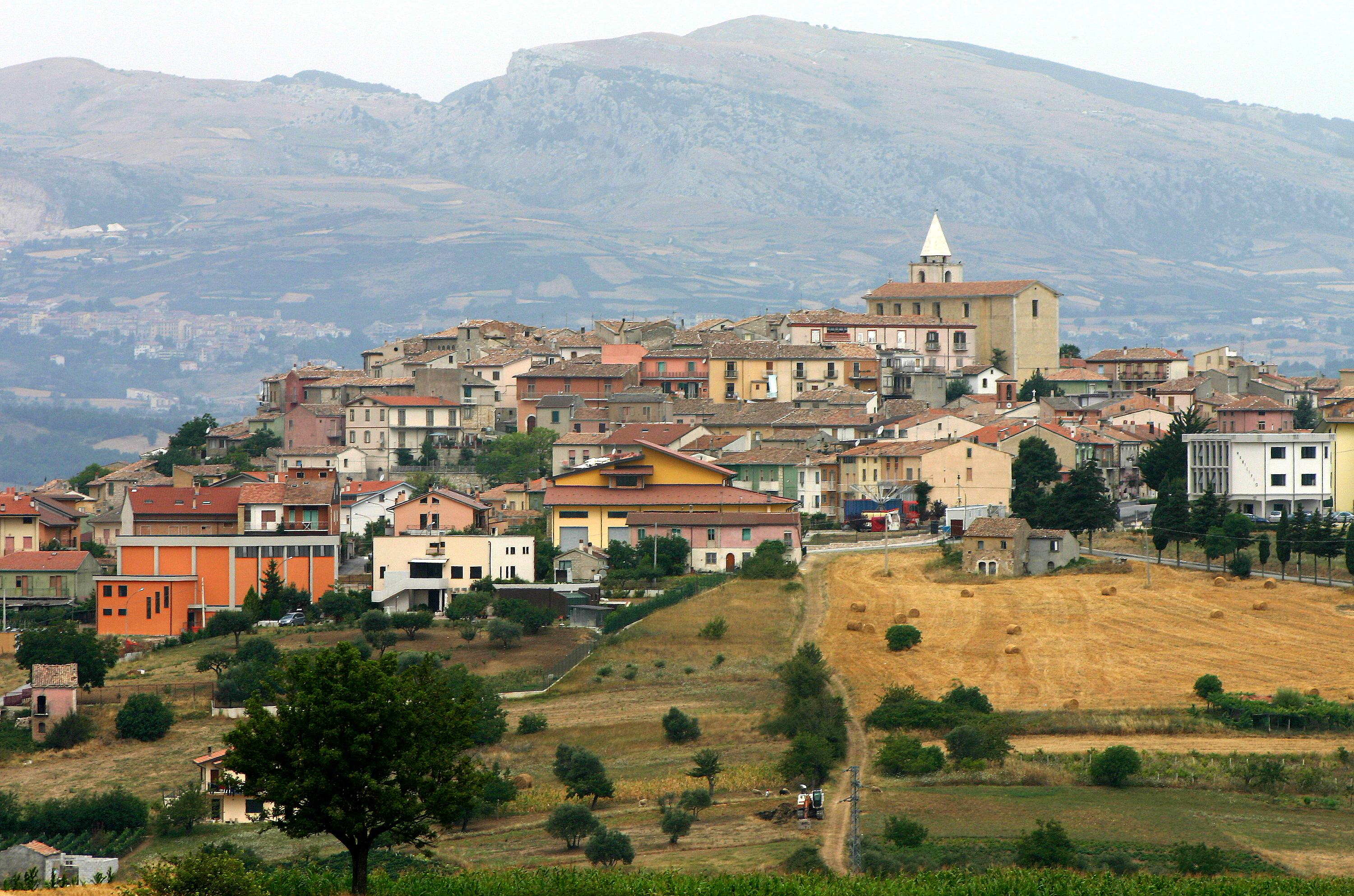 Busso-2005-08-11-06